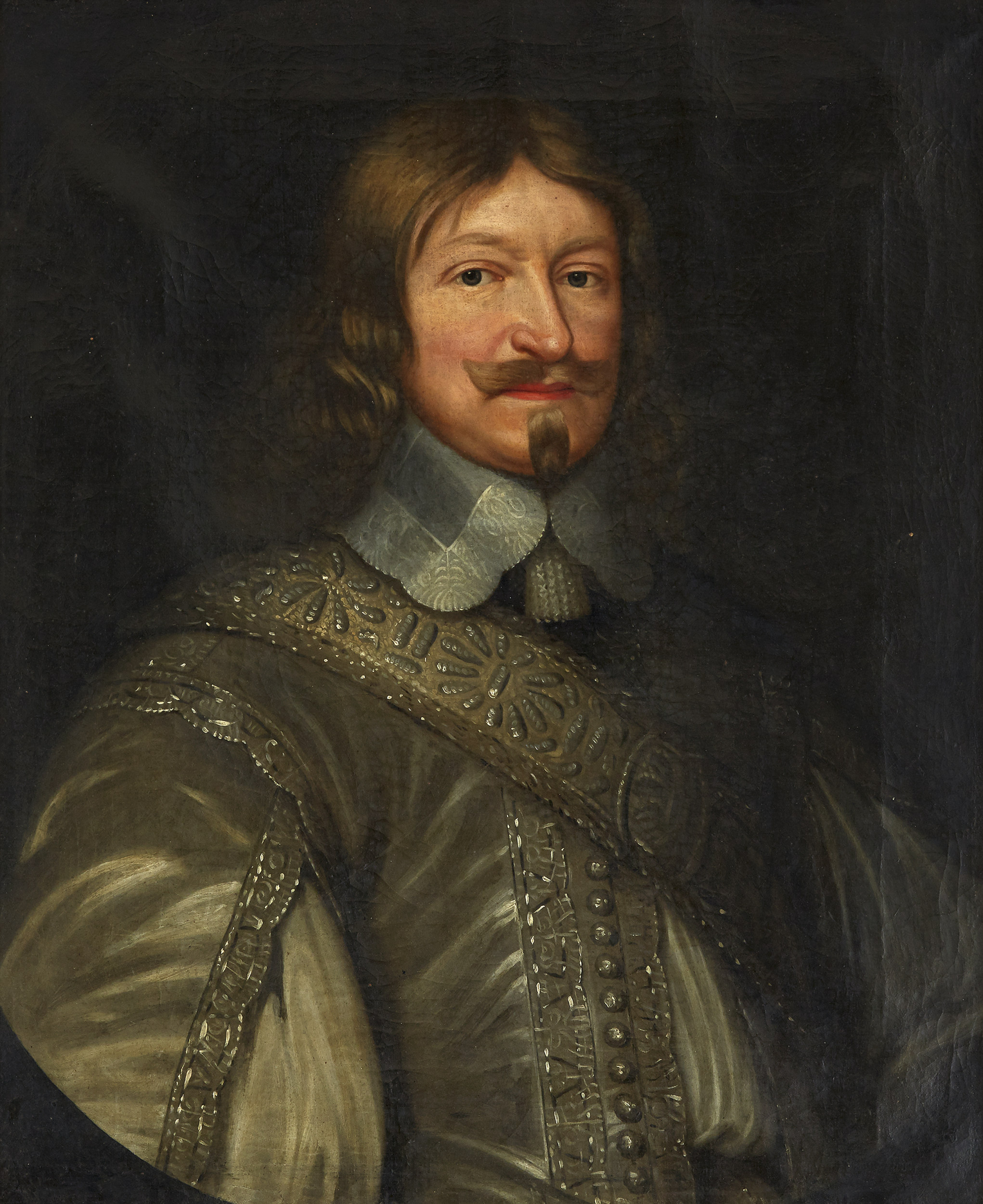 Porträtt föreställande fältmarskalk Lennart Torstensson (1603-1651) i silverbroderad grå rock - midjebild. Avporträtterad av David Beck (hans efterföljare), omkring 1700. Olja på duk, 71 x 58 cm. Möjligen identisk med målning registrerad på Nationalmuseum (SAP 1925:428)